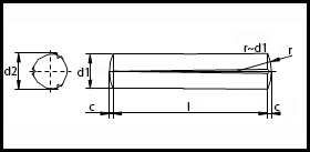 ISO 8744